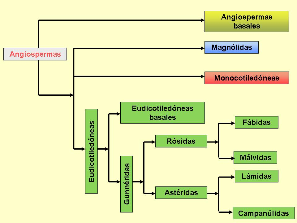 Gráfico que ilustra las relaciones filogenéticas entre los grandes grupos de angiospermas. Basado en el árbol publicado por el Angiosperm Phylogenetic Group en 2009 (ver APG III)